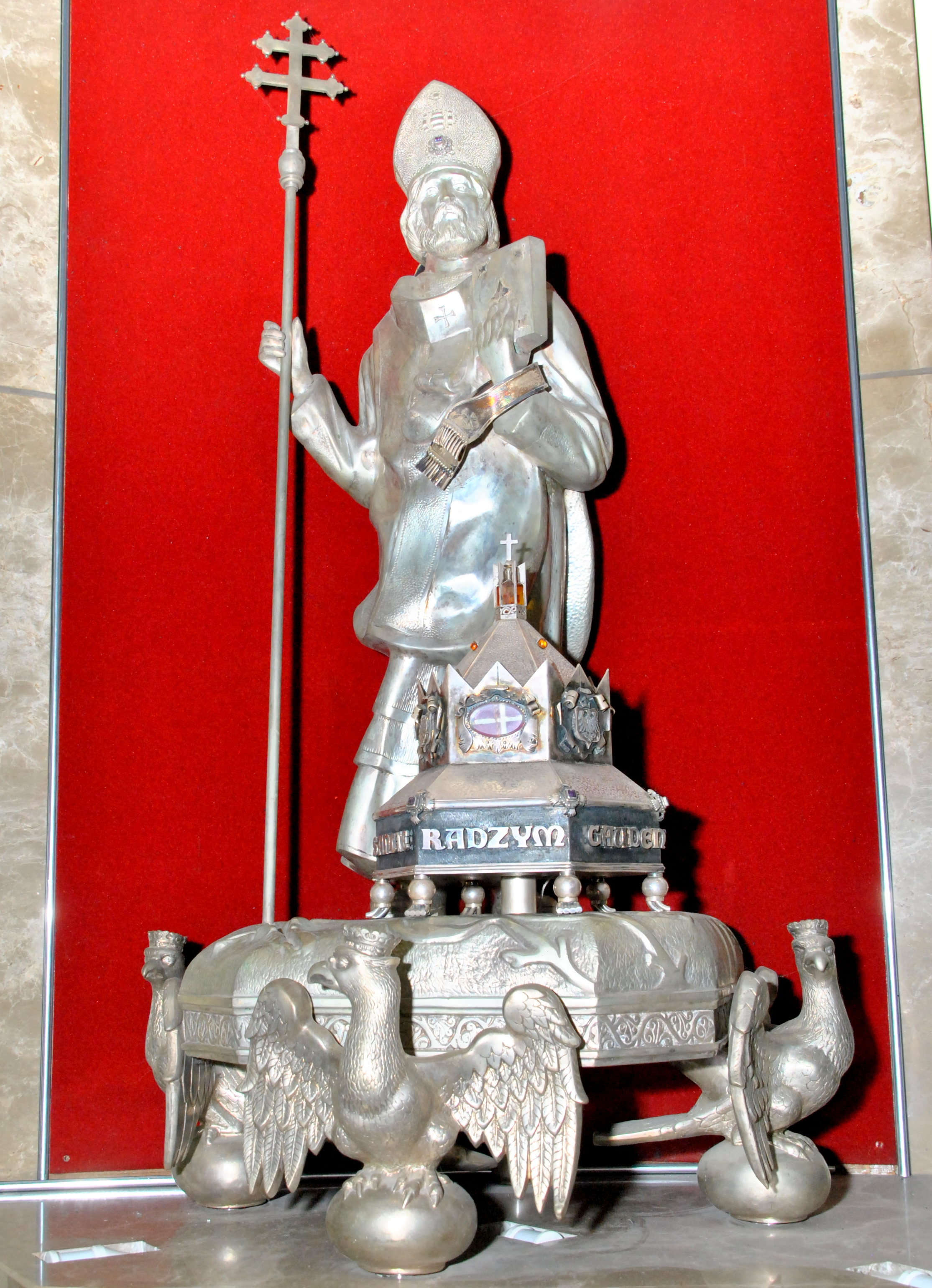 Relikwiarz Radzyma Gaudentego